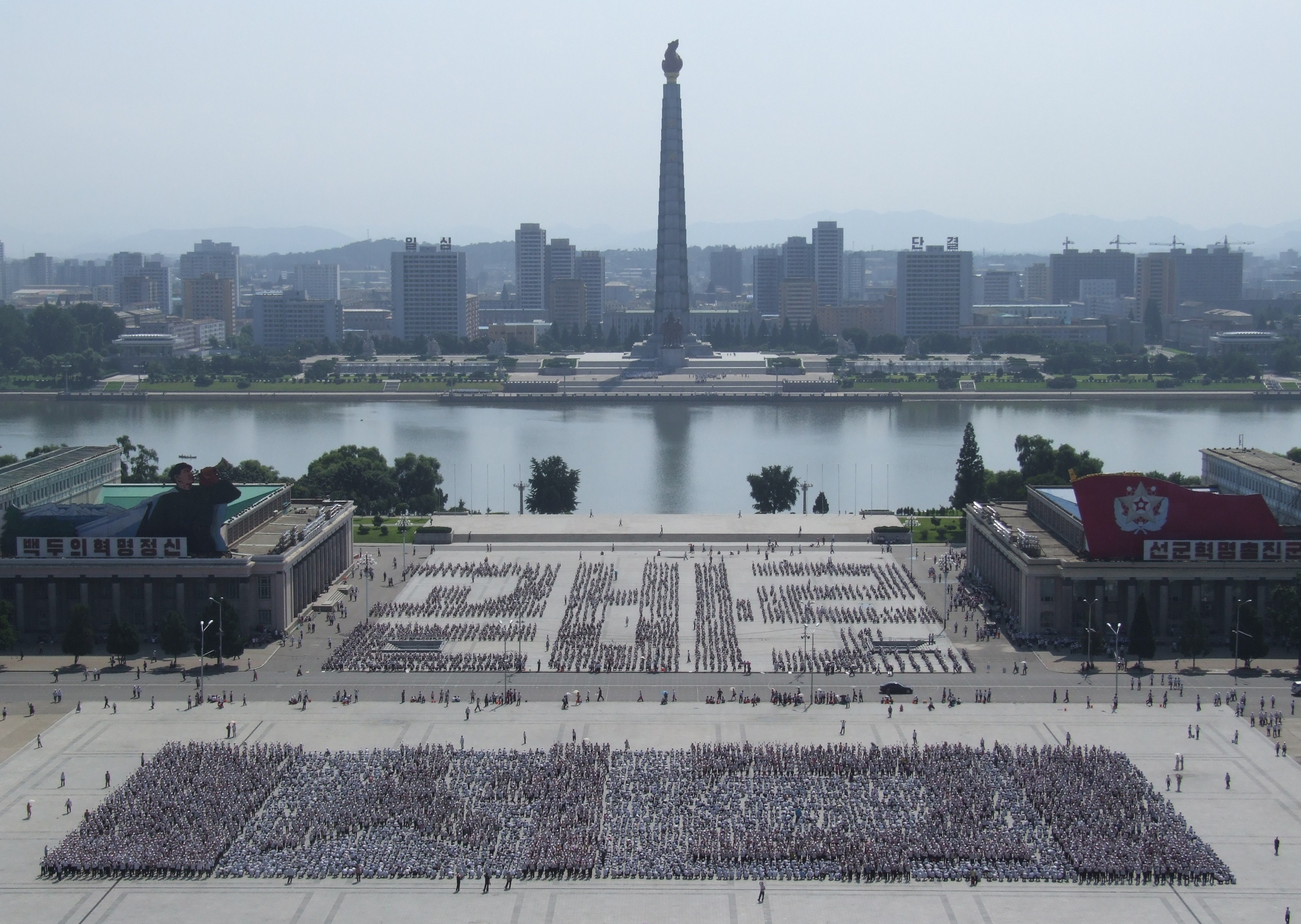 Kinder proben einen Fackelmarsch auf dem Kim-Il-sung-Platz in Pjöngjang